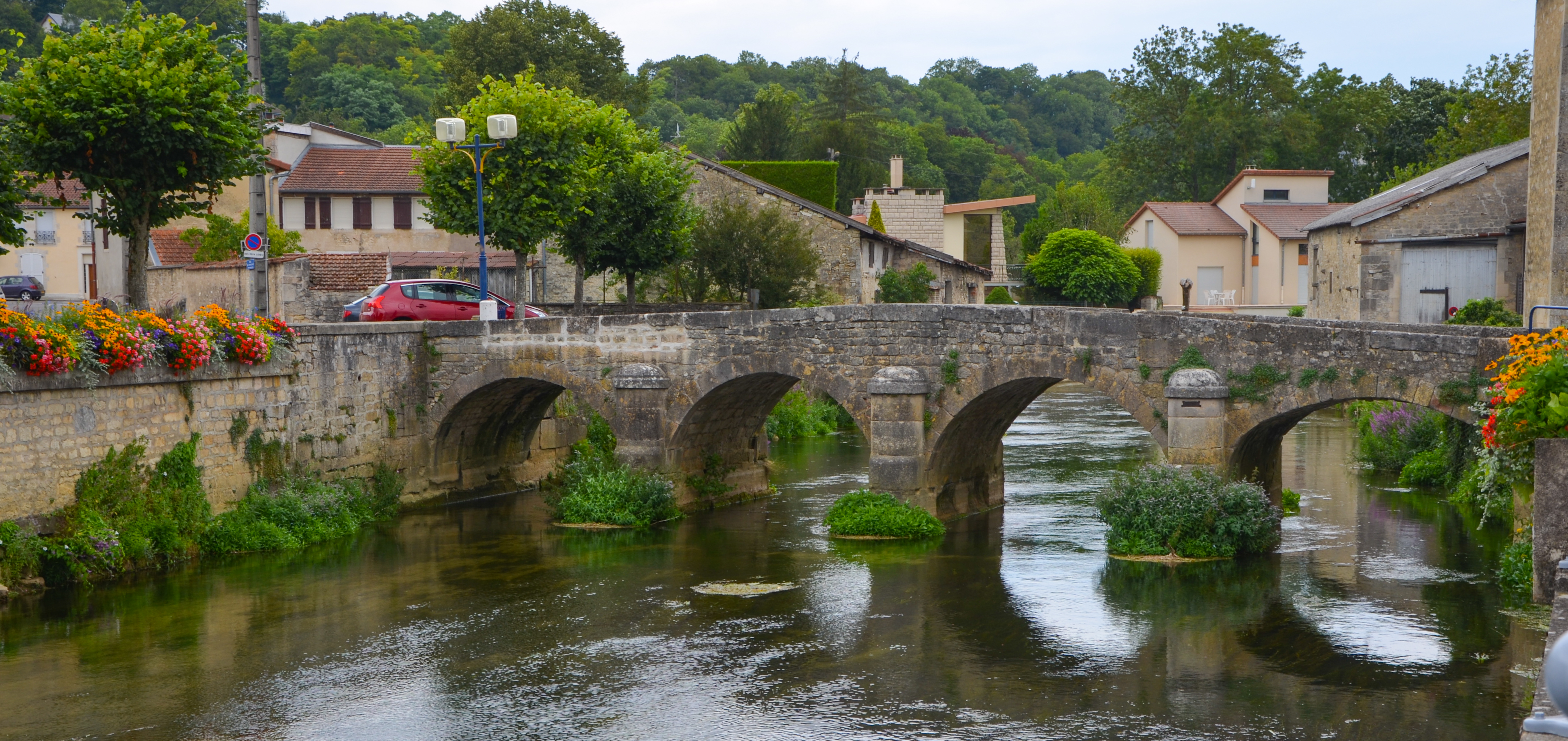 Poncelot à Joinville sur un bras de la Marne, Haute Marne, Champagne-Ardennes, France .